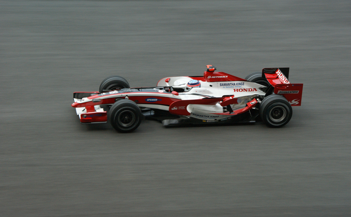 Takuma Sato, Super Aguri SA08, 2008 Malaysian Grand Prix